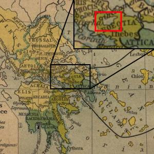 Mapa con la situación del Lago Copaide, Beocia, Grecia.